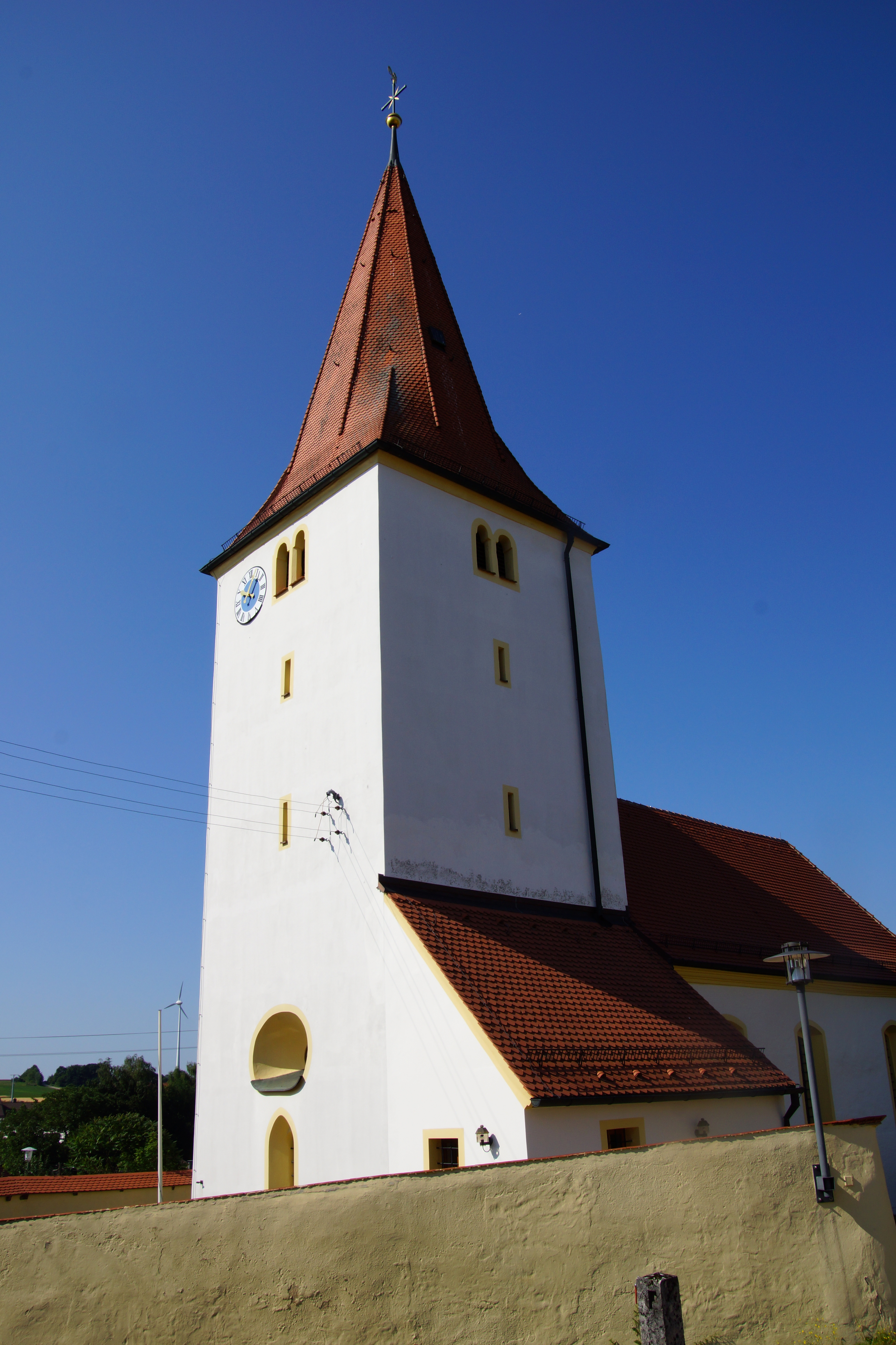 Die katholische Pfarrkirche St. Willibald in Traunfeld, Markt Lauterhofen in der Oberpfalz